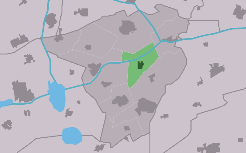 Kaartsje fan himrik fan Stynsgea